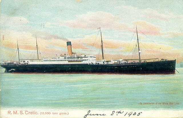 Česky: SS Cretic na staré pohlednici